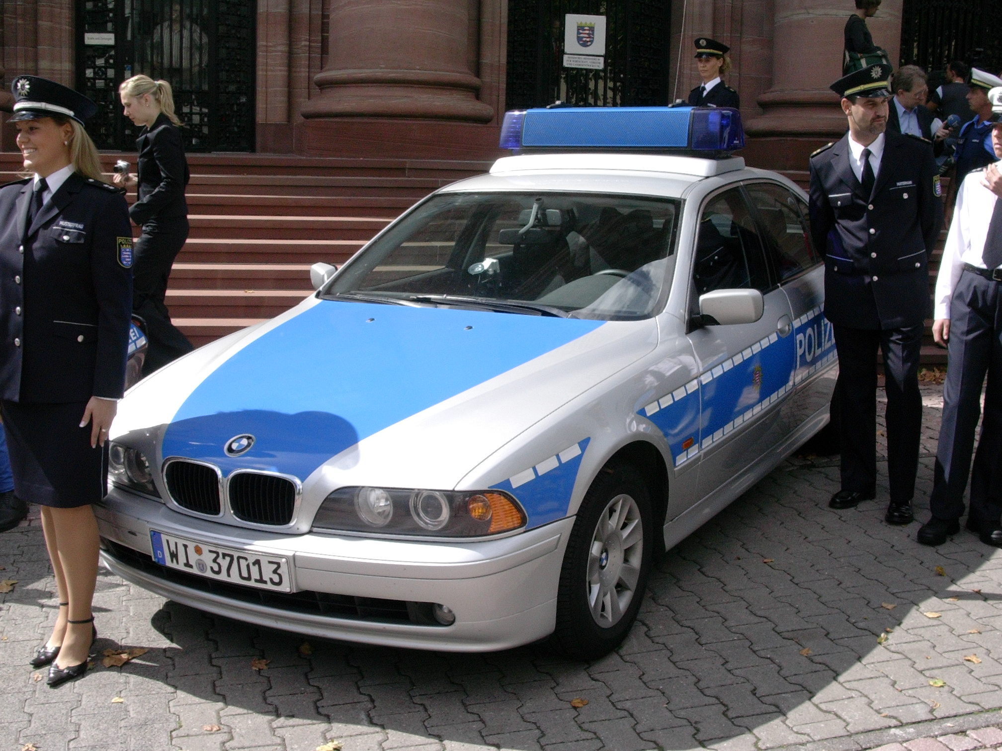 Neue blaue Uniform der Polizeien der Länder Hessen, Rheinland-Pfalz und Thüringen